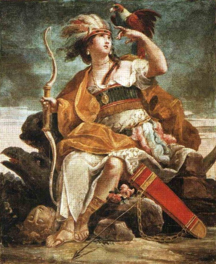 Allegoria dell'America, affresco di Domenico Muzzi nel Palazzo Sanvitale di Parma.